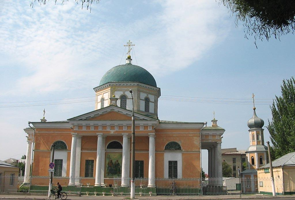 Катедральний Свято-Духівський собор у Херсоні (серпень 2007)